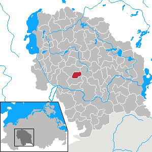 Severin in Mecklenburg-Vorpommern - District Parchim